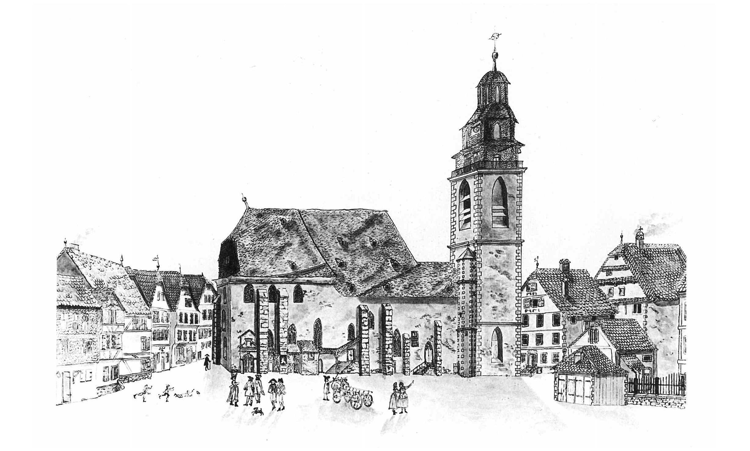 undatierte Pinselzeichnung der gotischen Stadtkirche Gießen im Oberhessischen Museum in Gießen, Hessen, Deutschland